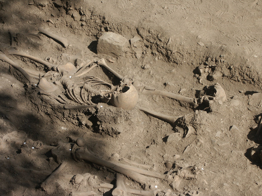 Castel di Pietra, Parco tecnologico archeologico delle colline metallifere grossetane